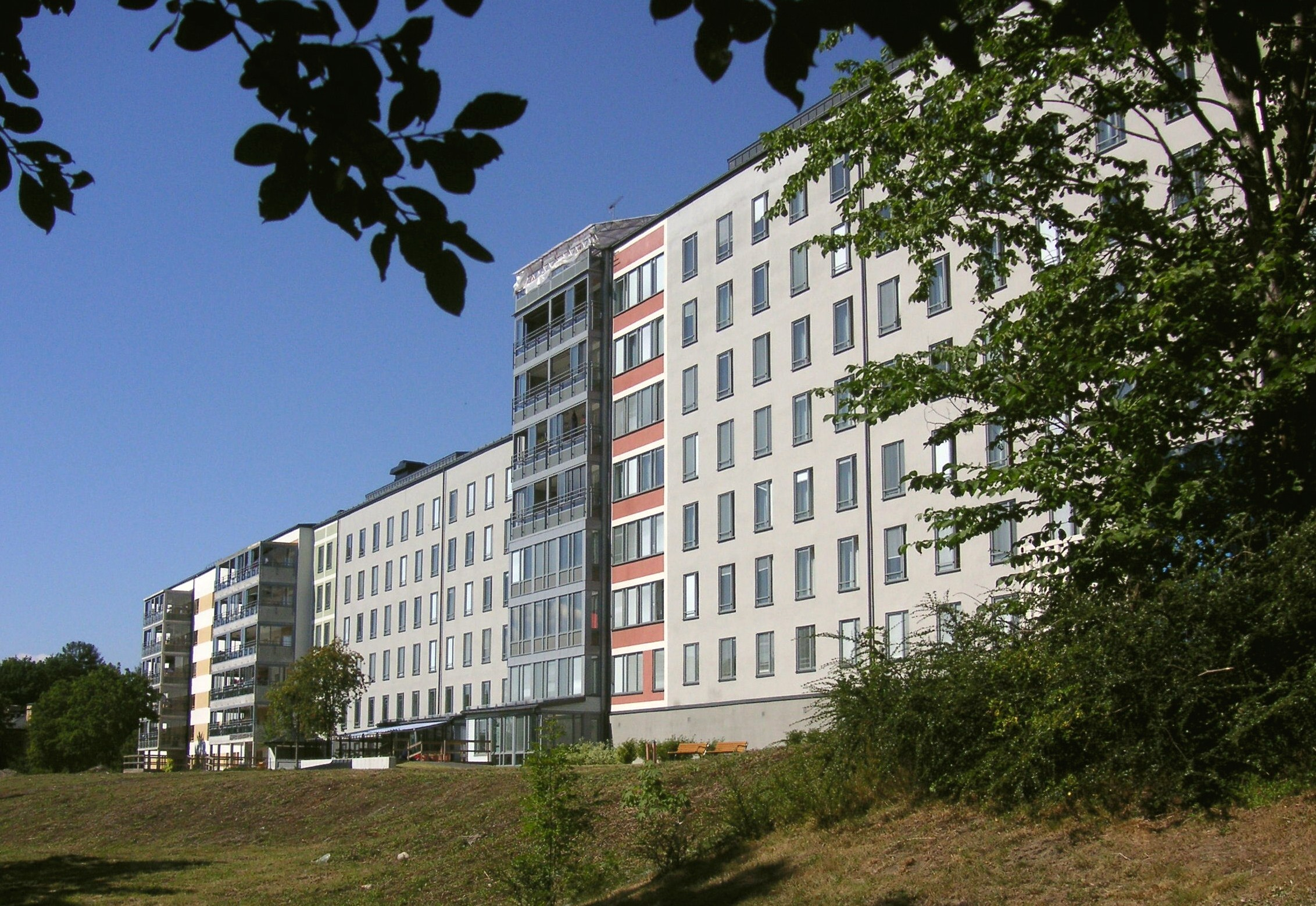 Blackebergs sjukhus, Bromma, Stockholm